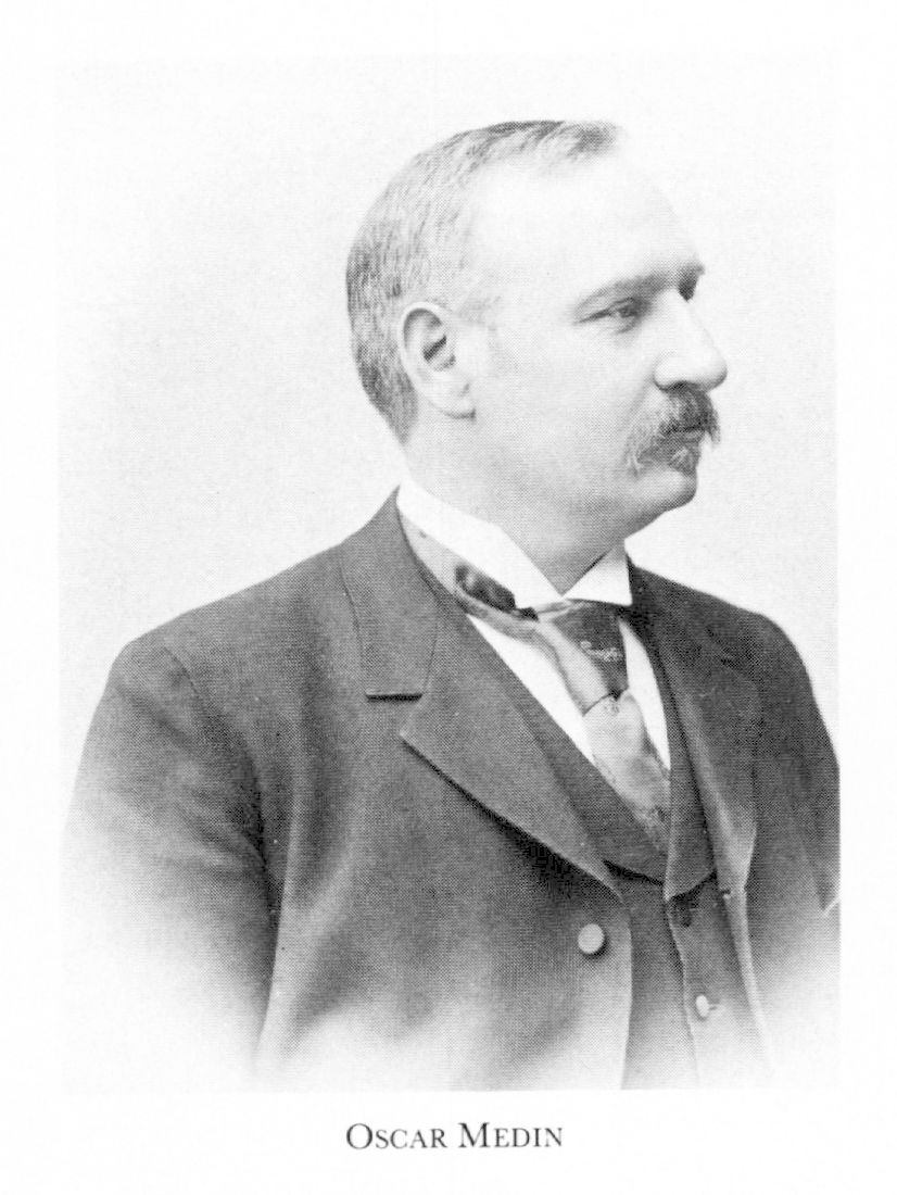 Oscar Medins porträtt av okänd upphovsman